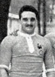 Jean-Marie Arnal en janvier 1914.